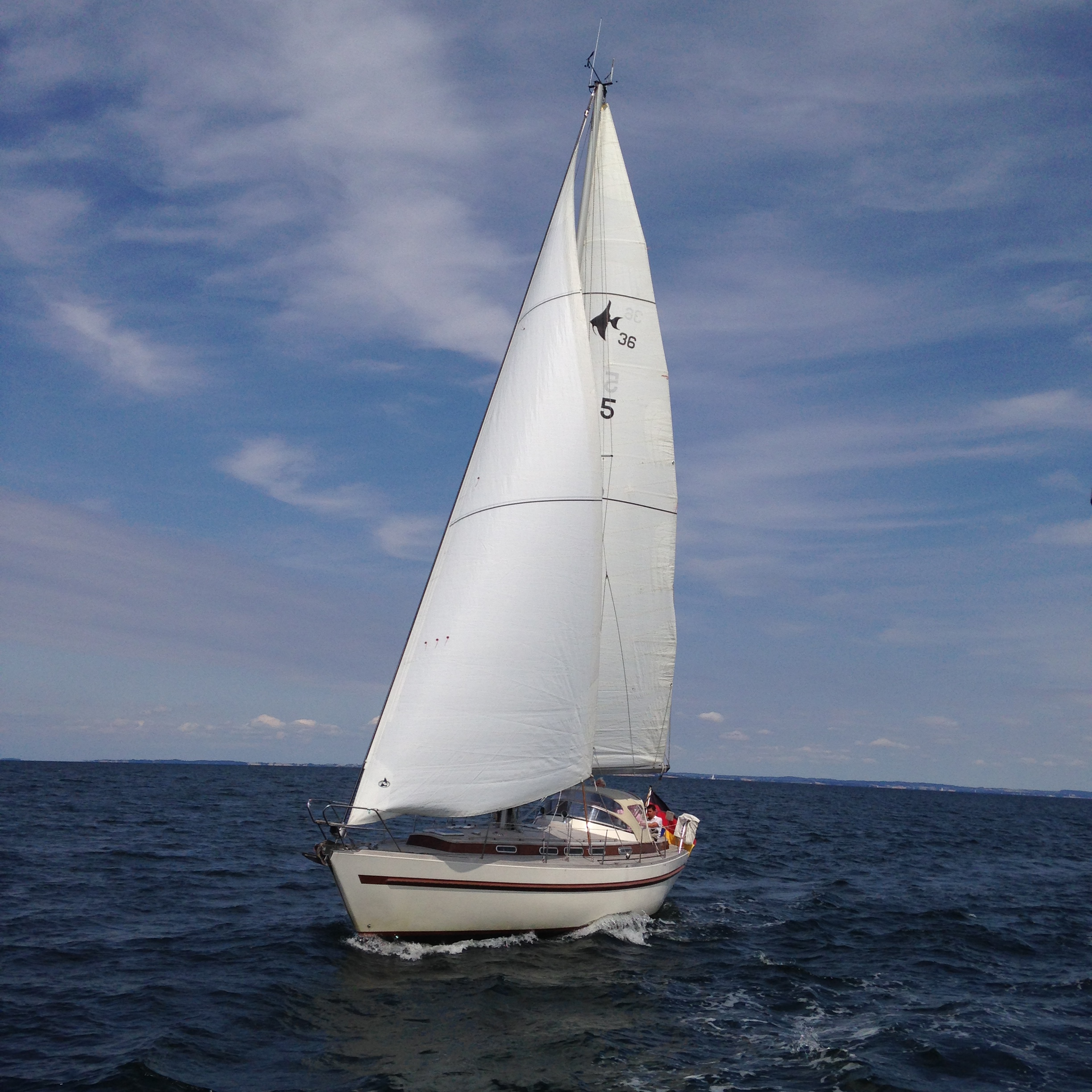 Coronel III